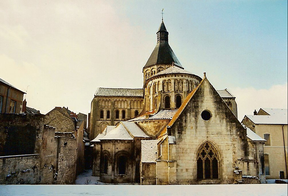 Church in La Charité sur Loire